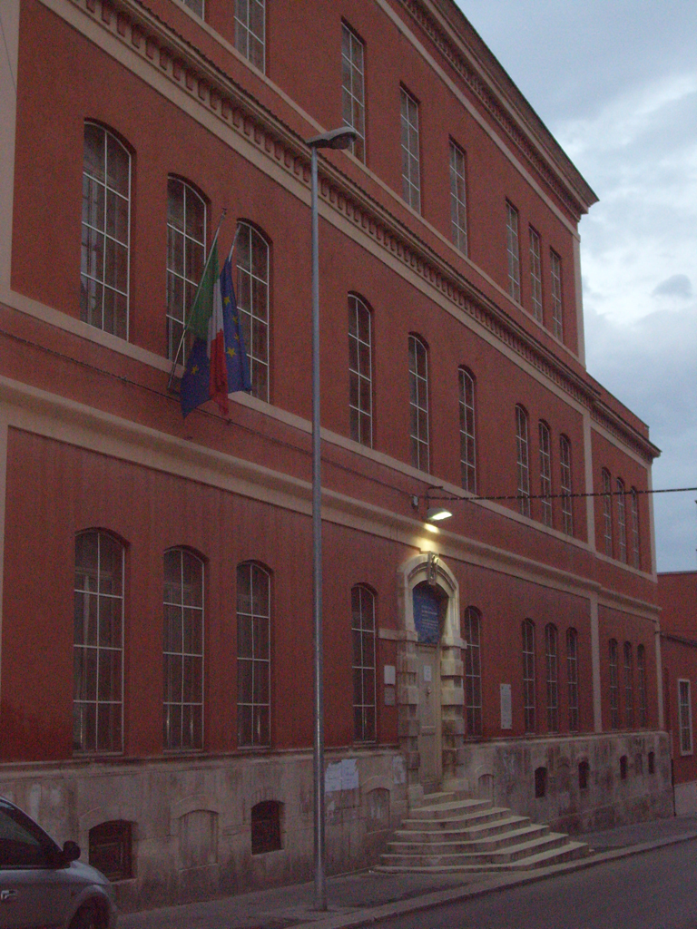 Facciata della scuola "G. Carducci" (Defizia) di Cerignola.